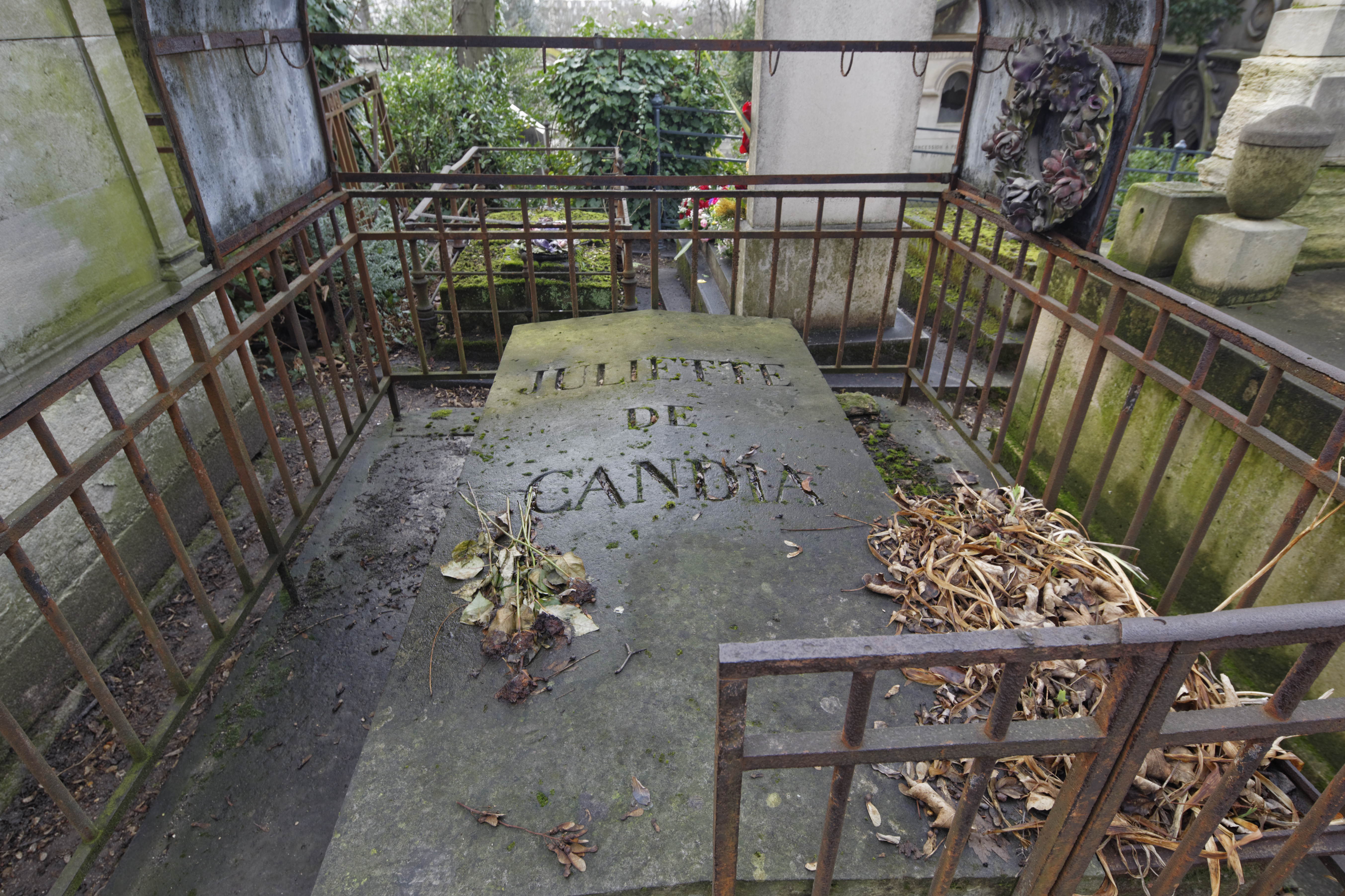 Vue d'ensemble